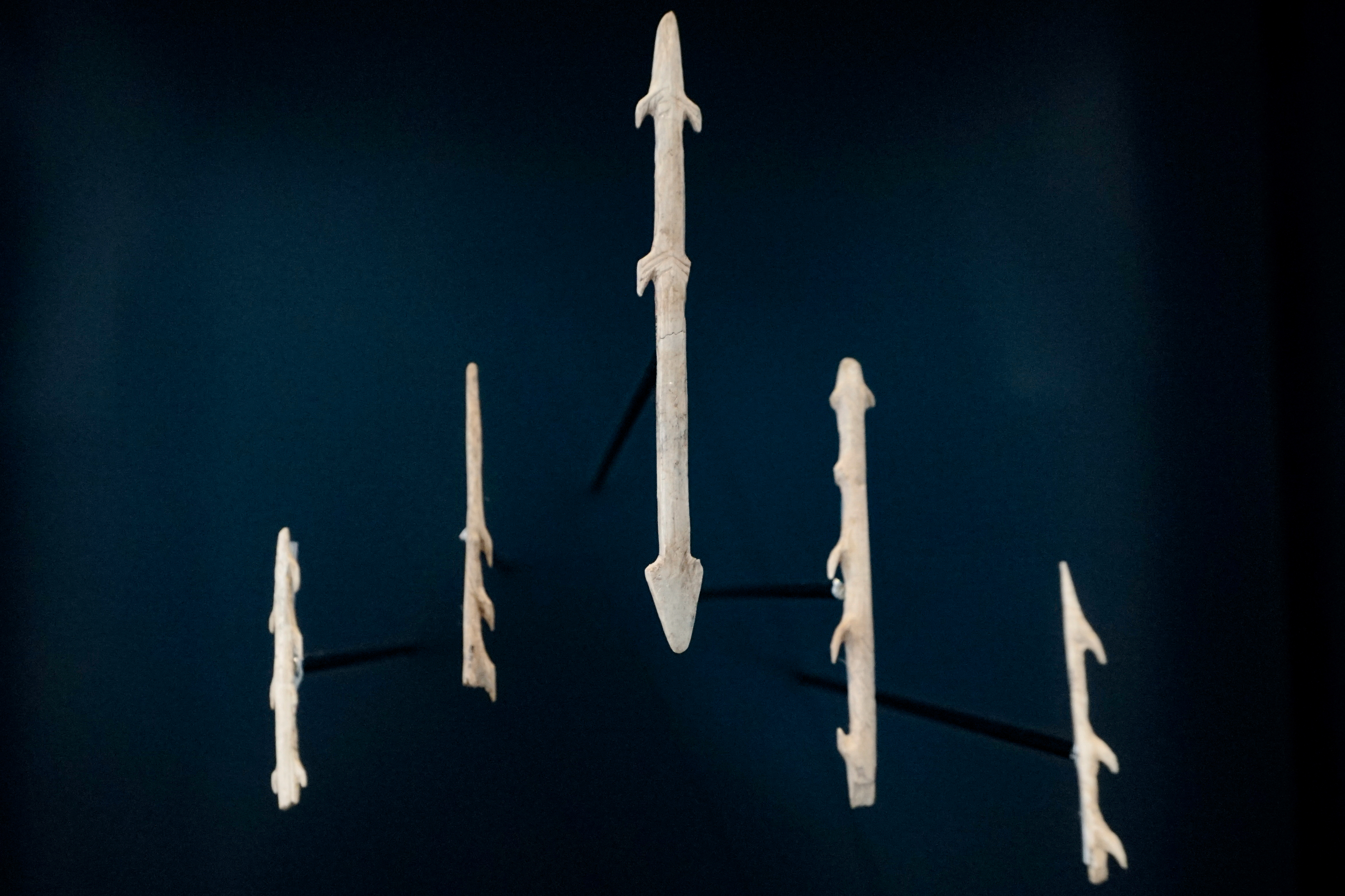 Fünf Harpunen, Rengeweih, teilweise mit Kerben verziert, Brillenhöhle, Blaubeuren-Seißen, Magdalénien, ca. 12.000 - 16.000 Jahre alt